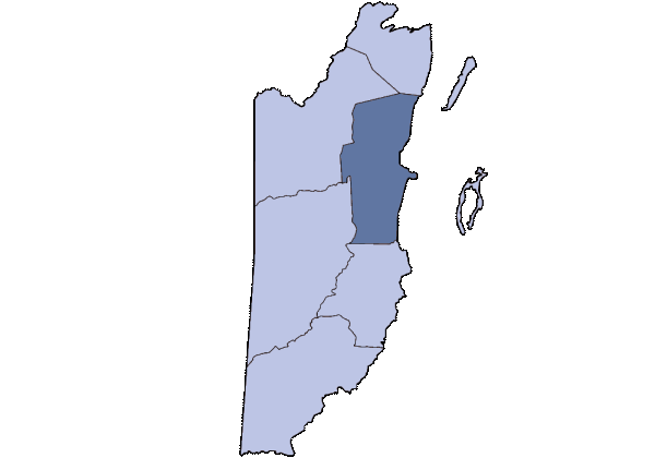 Belize District in Belize